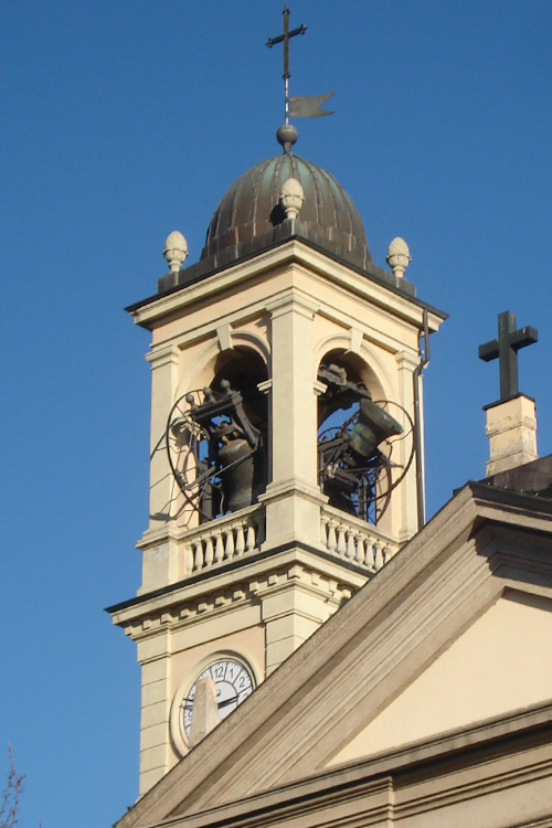 Il campanile della prepositurale di Cesano Boscone (MI)